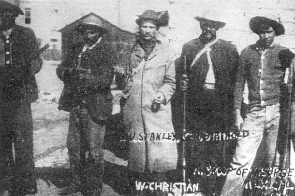 Soldados magonistas en Mexicali, 1911 durante la Rebelión de Baja California. William Stanley, de abrigo claro y Simón Berthold (centro derecha).